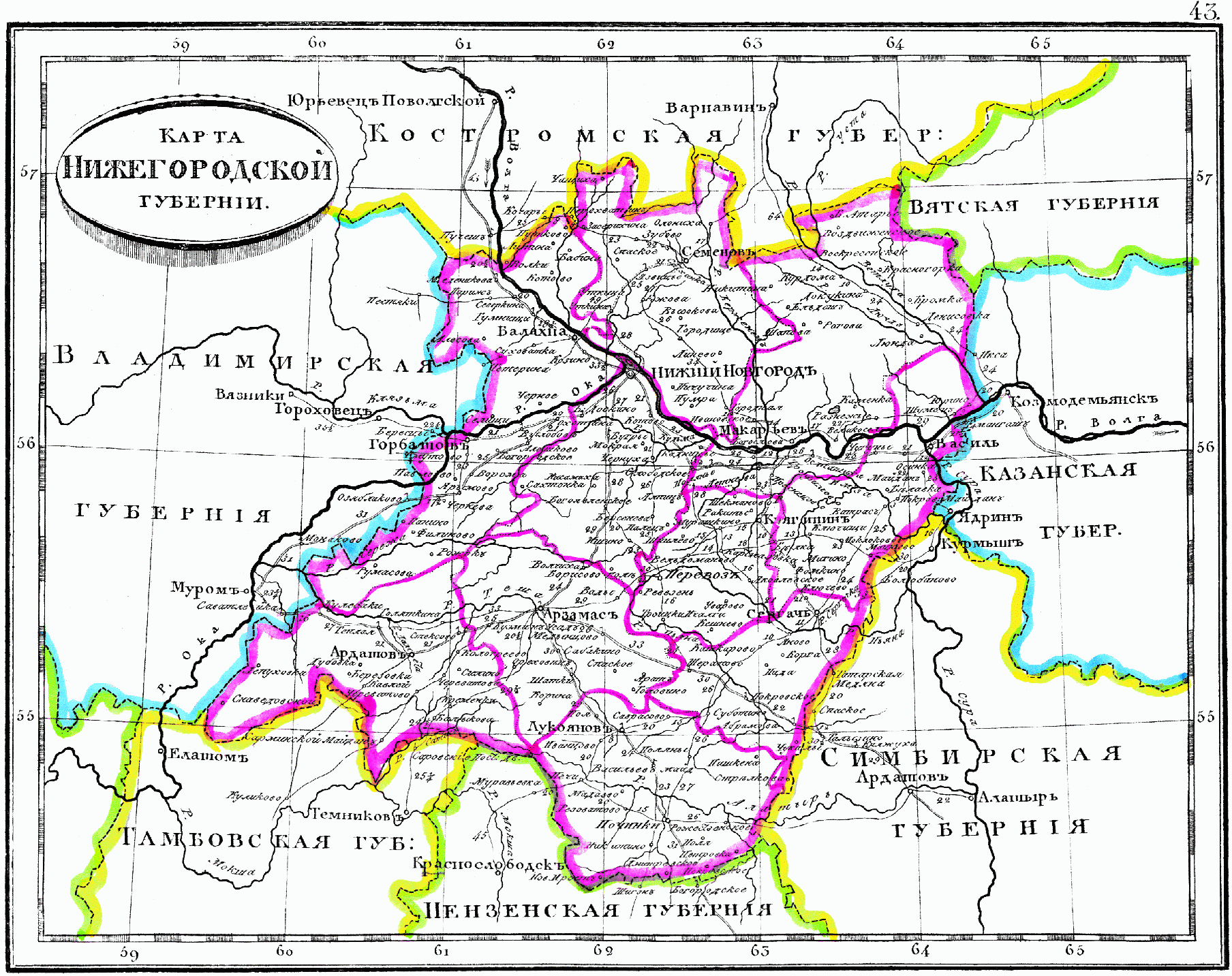 Карта Нижегородской губернии, 1835